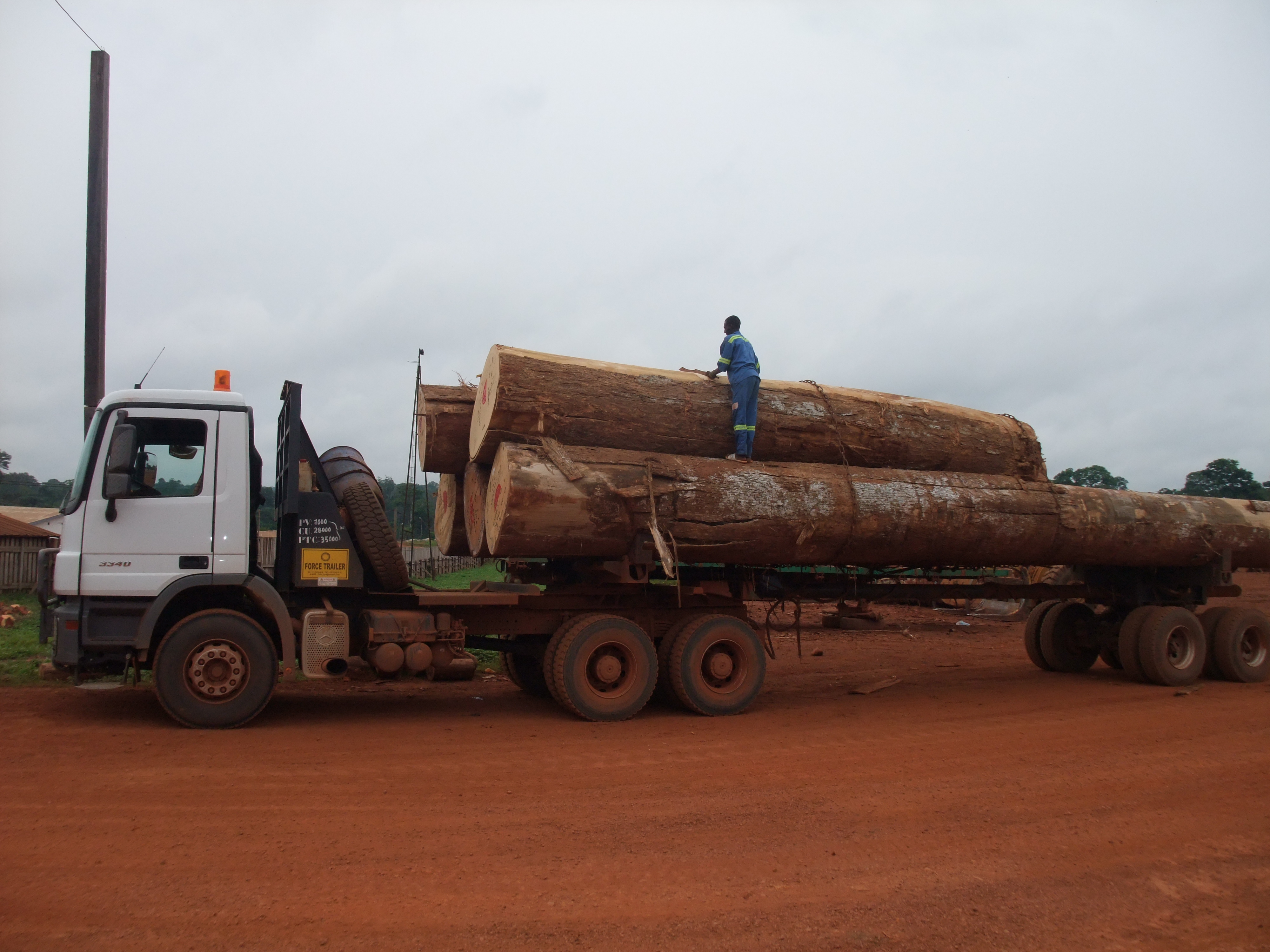 Grumier, camion transportant des troncs d'arbres, dans l'Est du Cameroun. Fin du chargement This is an image with the theme "Africa on the Move or Transport" from: Cameroon